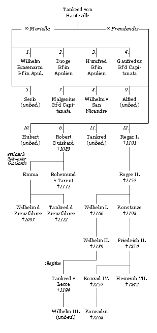 Tankret Hauteville Stammbaum